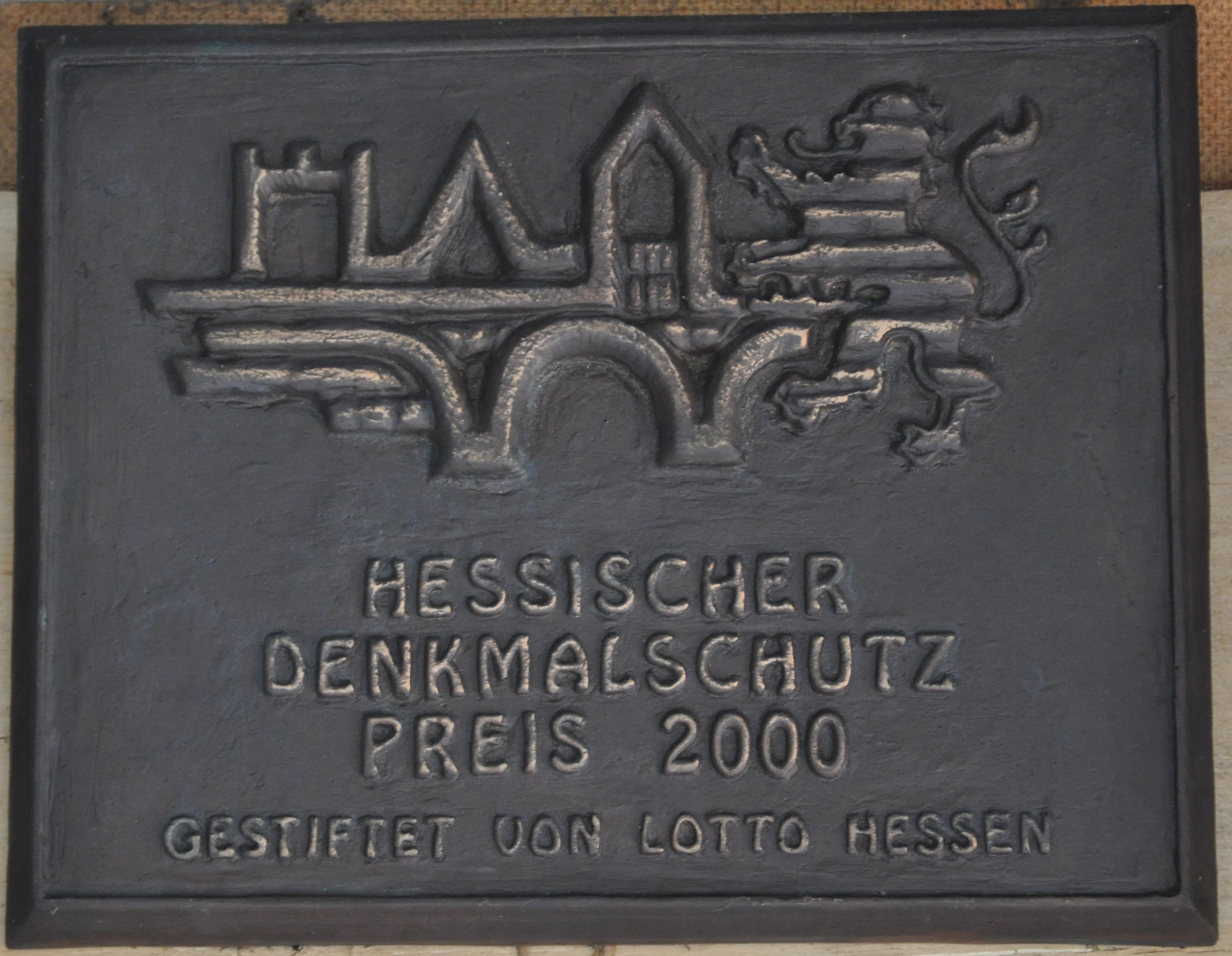 Plakette zum Gewinn des hessischen Denkmalschutzpreises 2000 für den Wasserturm Bad Soden